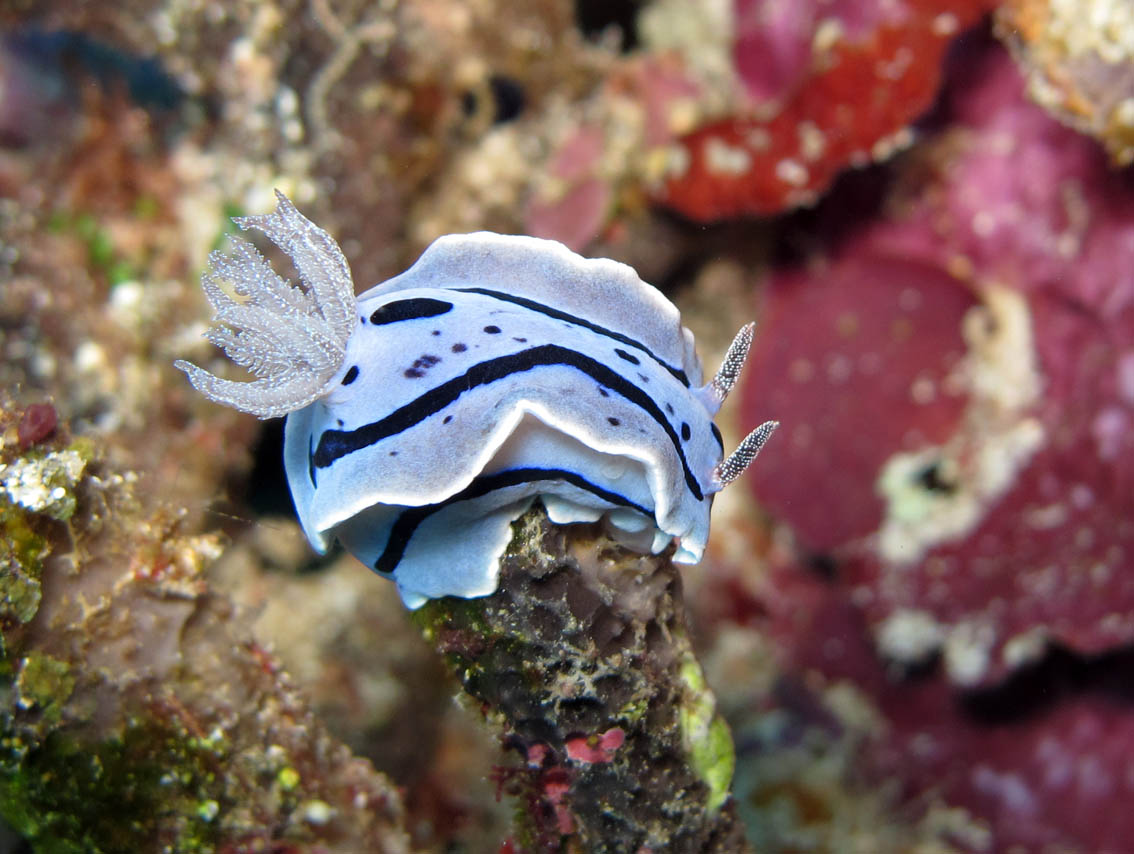 Manado 3-12-11 - 30 acrobatic